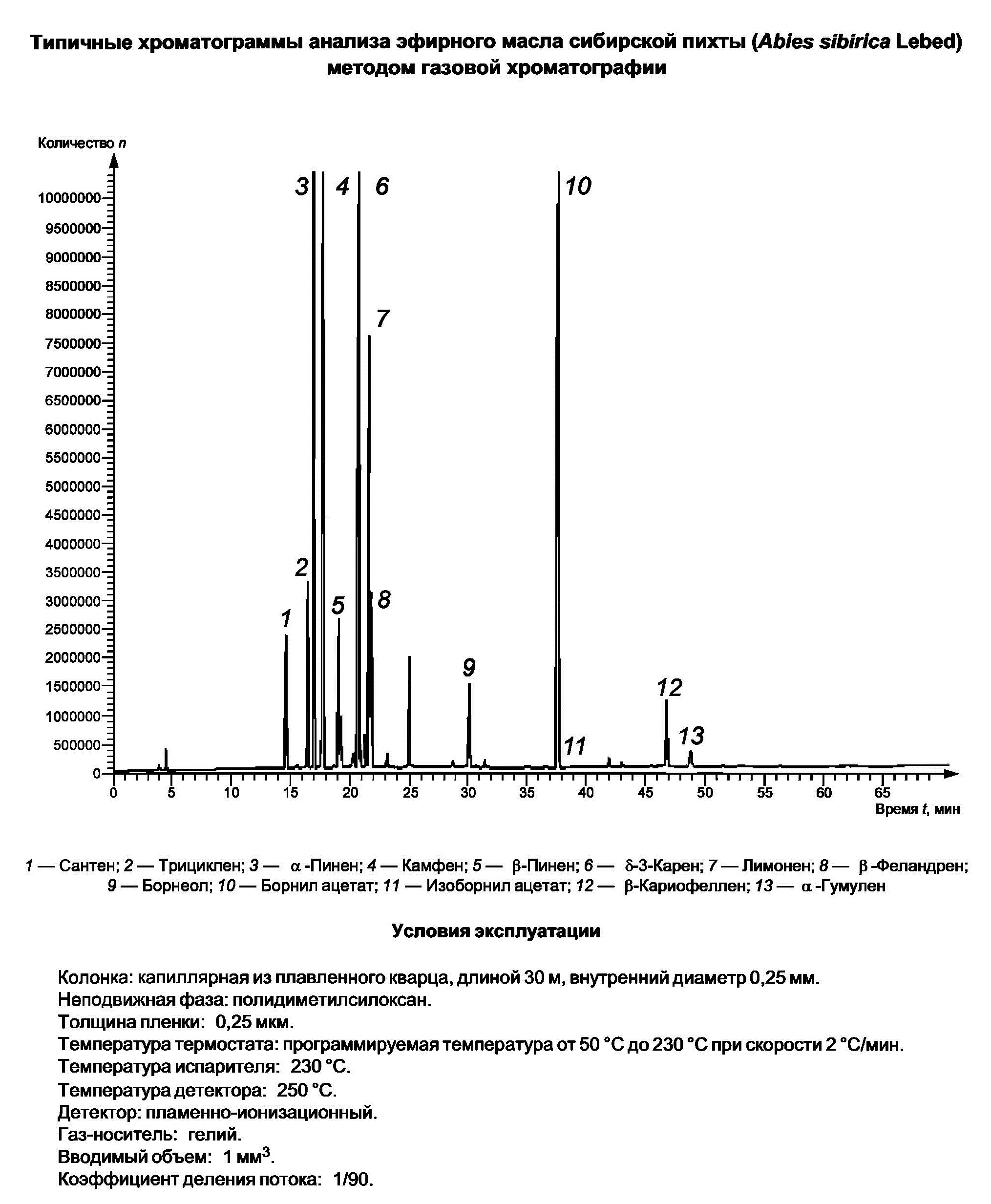 Выдержка из ГОСТ